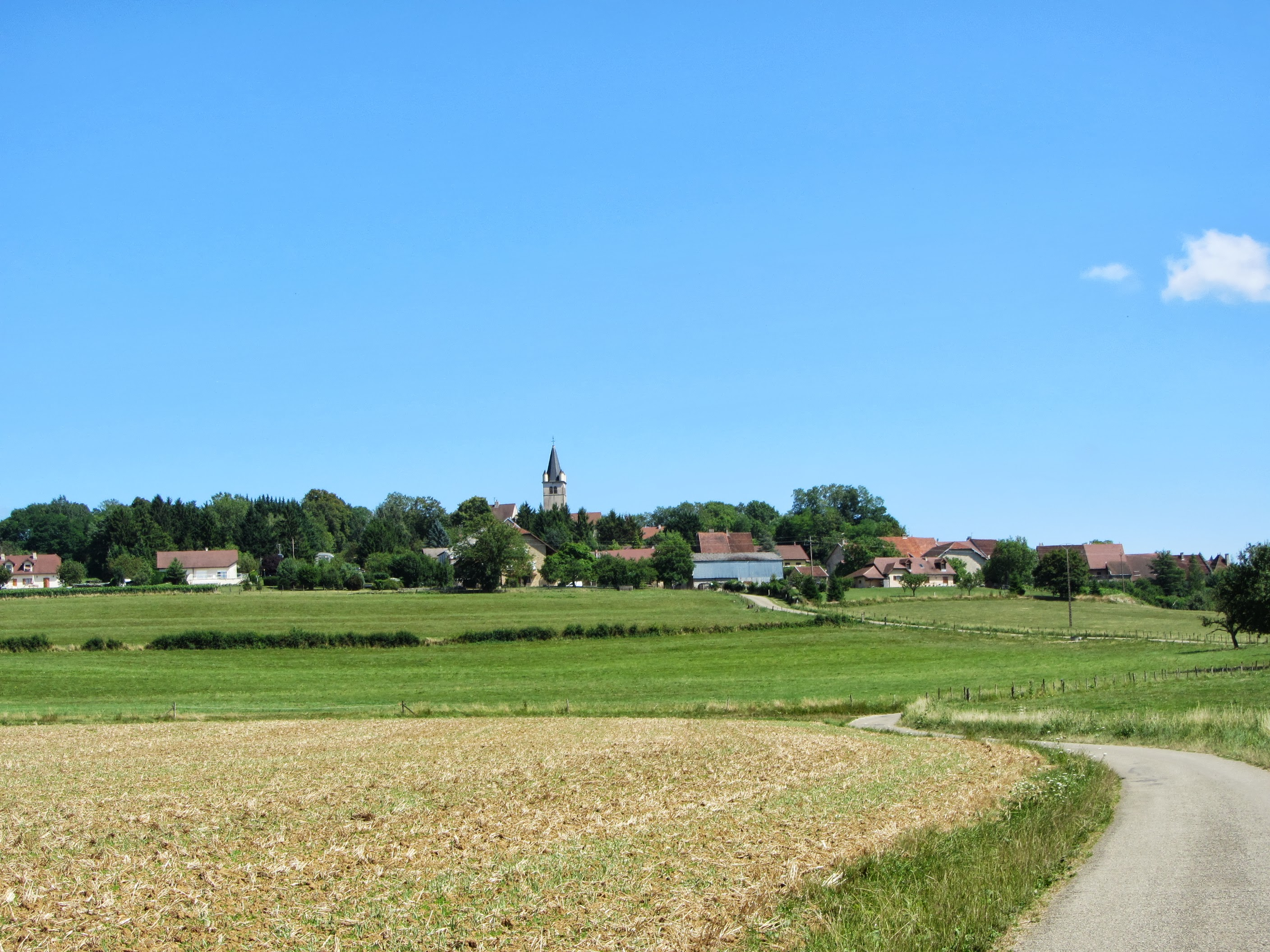 Vue sur Montain